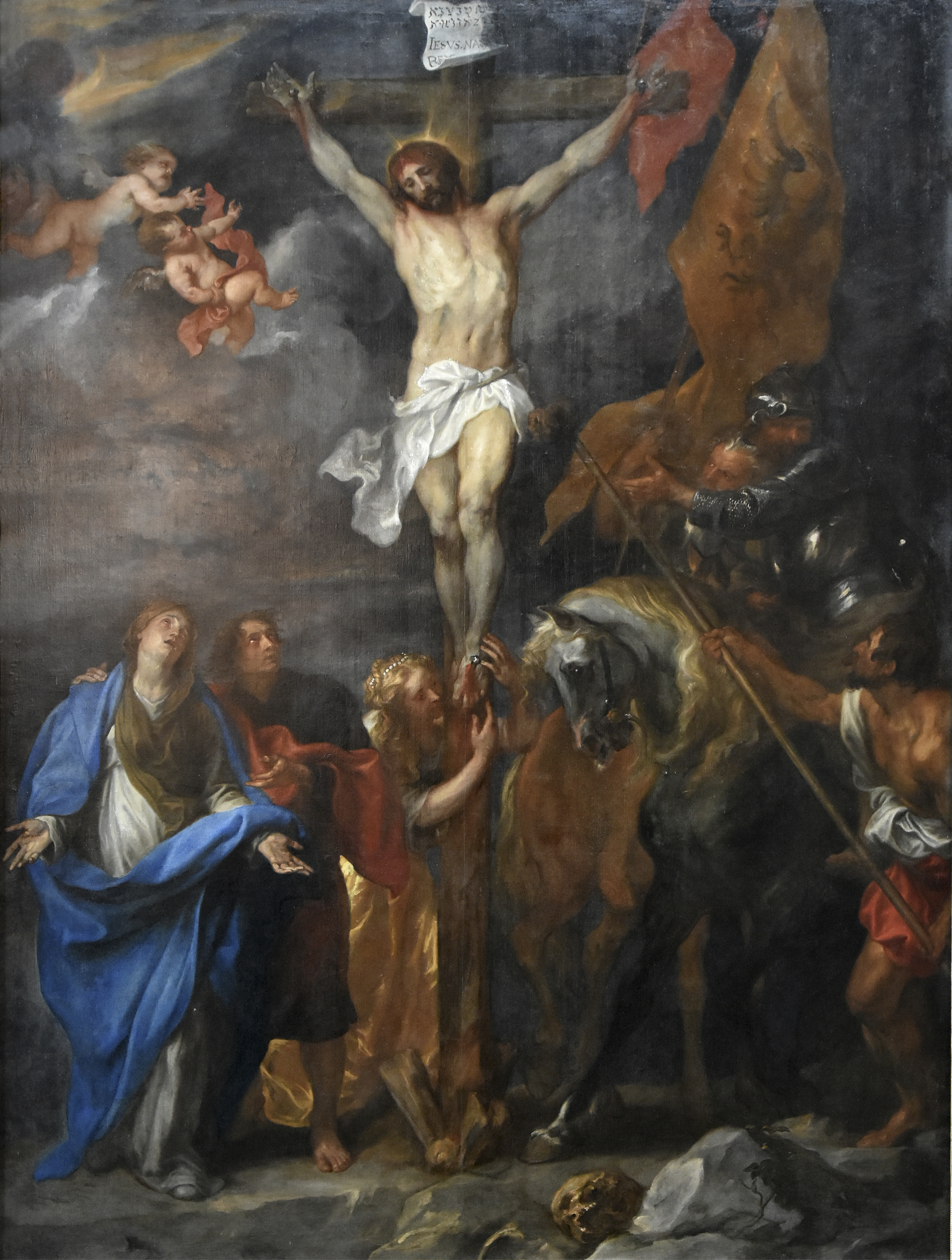 Antoon van Dyck (1599-1641) Christus aan het Kruis (1630) Sint-Michielskerk Gent 30-06-2019 This photo of movable heritage has been taken in the Flemish Region